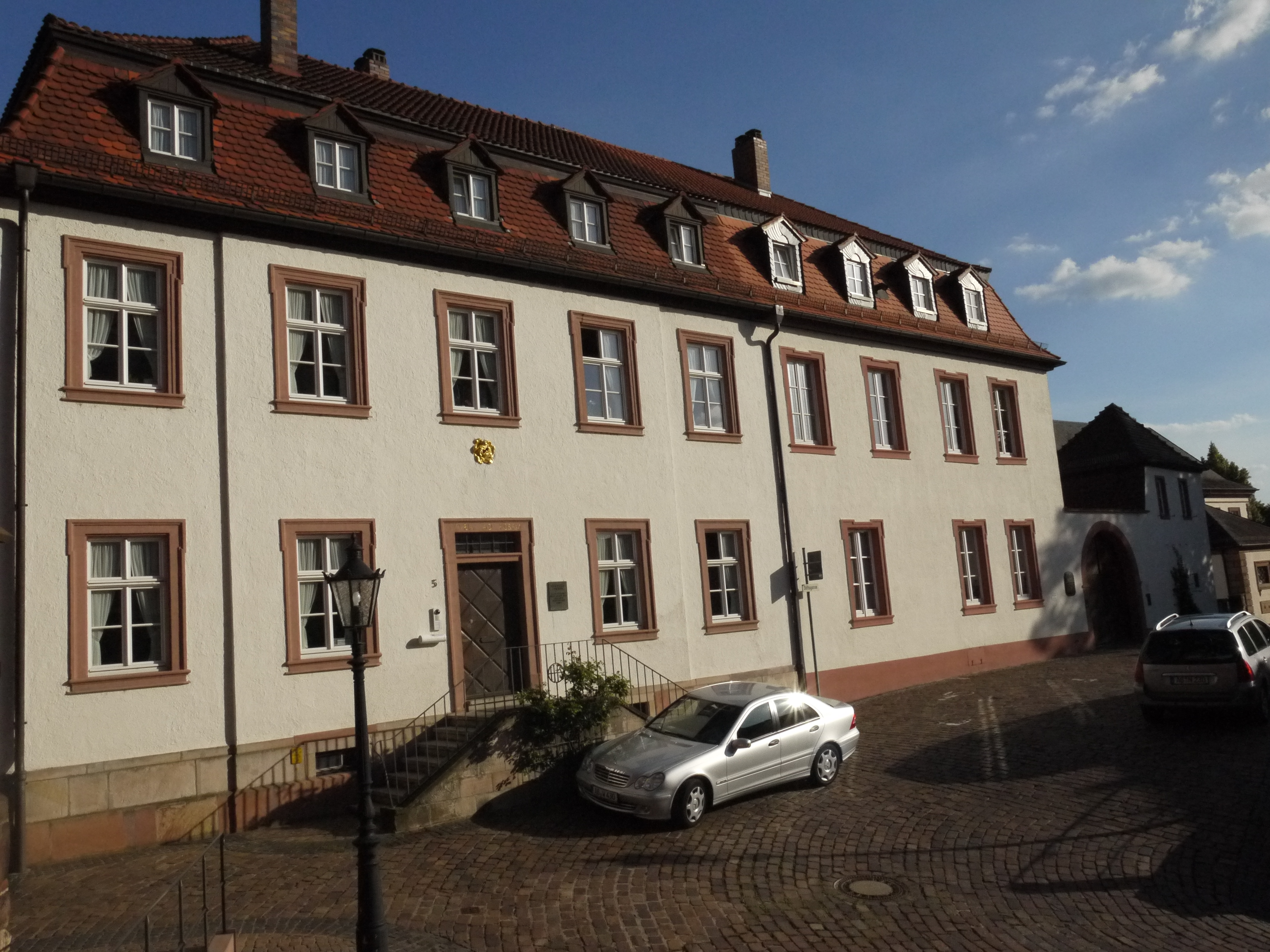 Stiftsgasse 5, Pfarrei der Stiftskirche in Aschaffenburg (denkmalgeschützt)